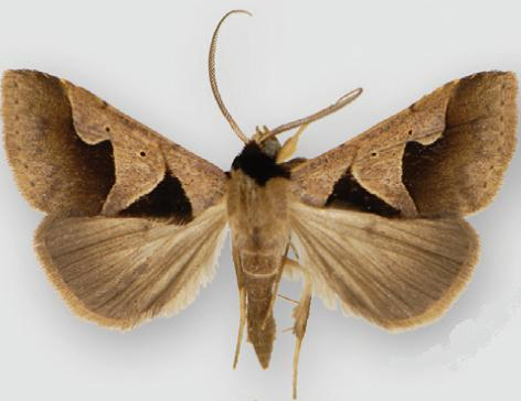 Anoba sp. trigonoides species complex, male